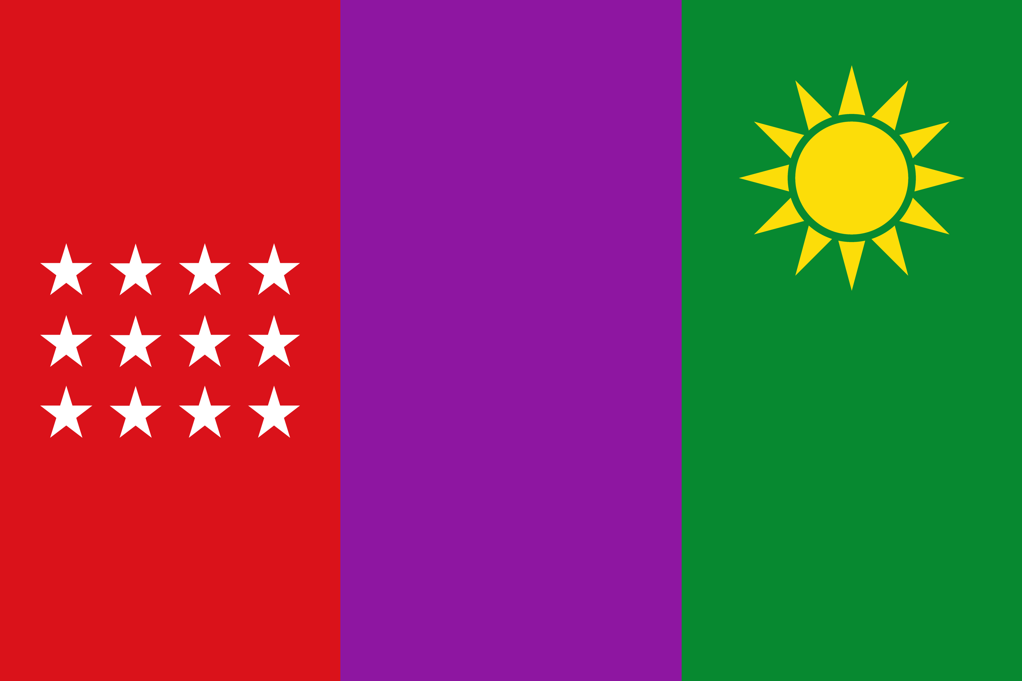 Bandera de la provincia y ciudad peruana de Jaén